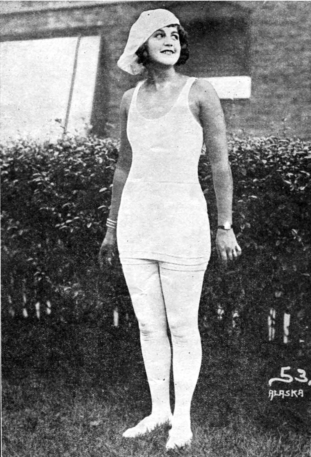 Helmar Liederman